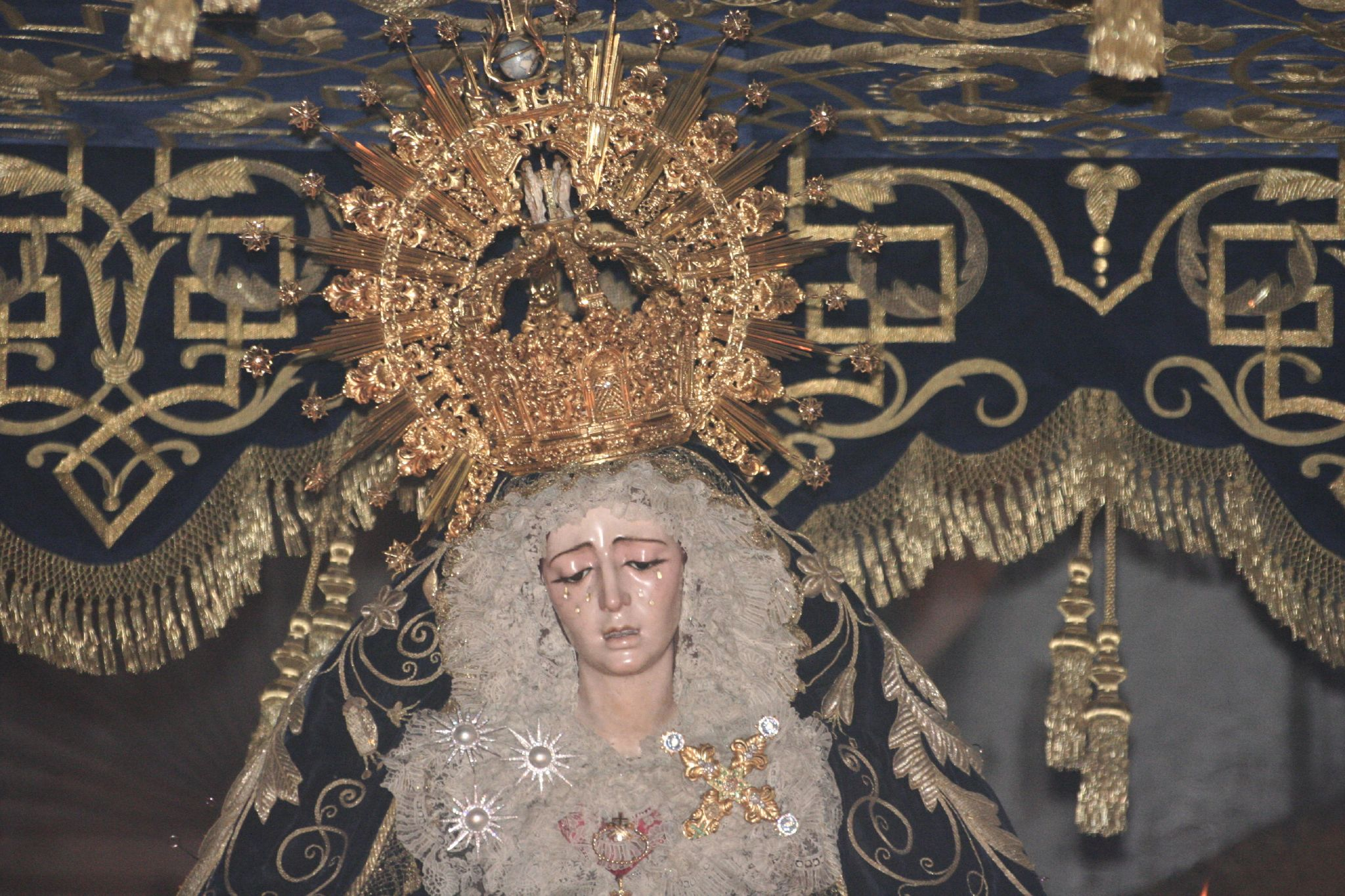 María Santísima de la Estrella. Semana Santa en Sevilla. Año 2006 Foto realizada y propiedad de Ángel Chacón